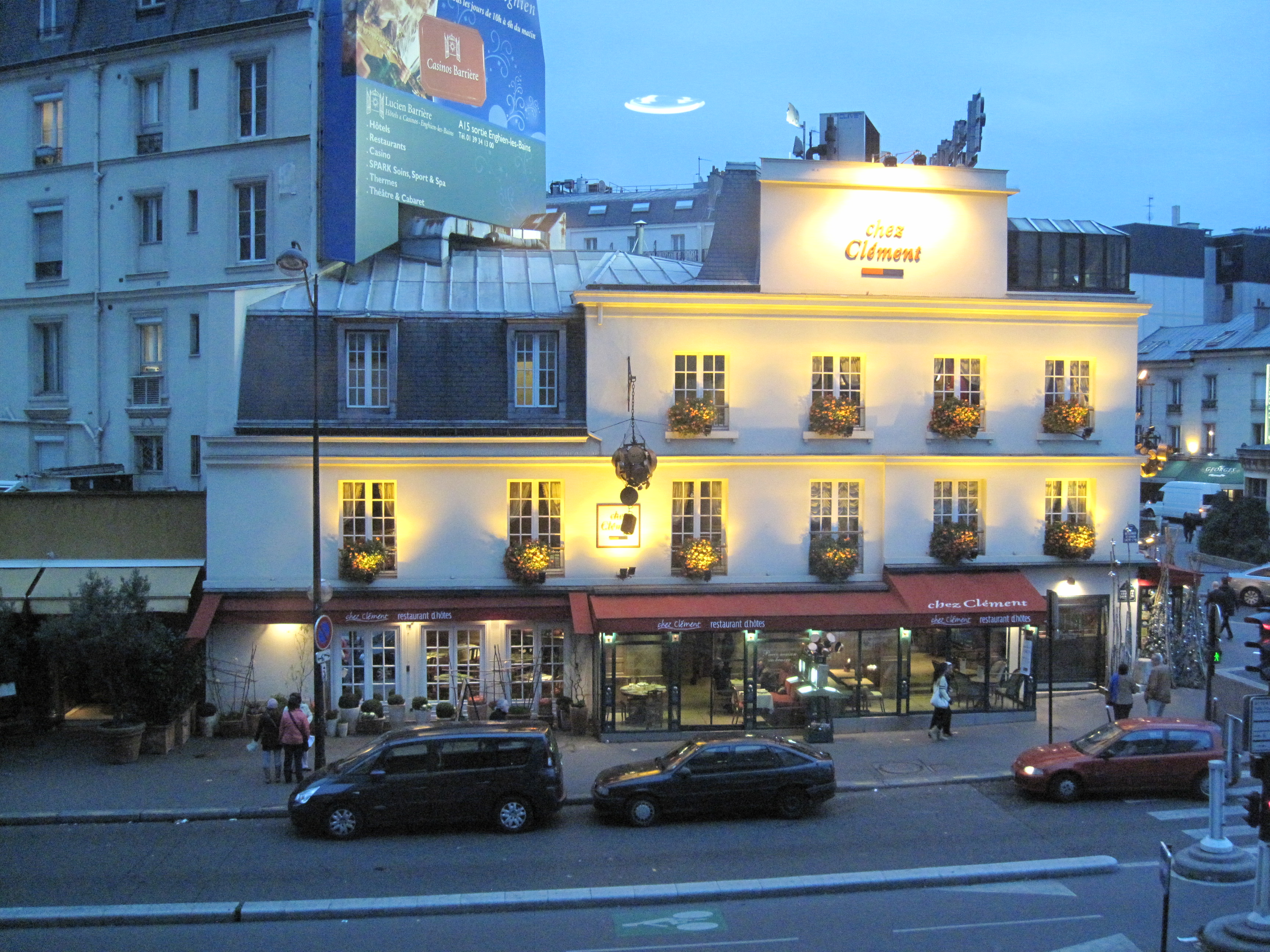 La façade fleurie et illuminée avec aussi des décorations de Noël du restaurant "Chez Clément" de la Porte Maillot. 99 boulevard Gouvion-Saint-Cyr, Porte Maillot, Paris, France.